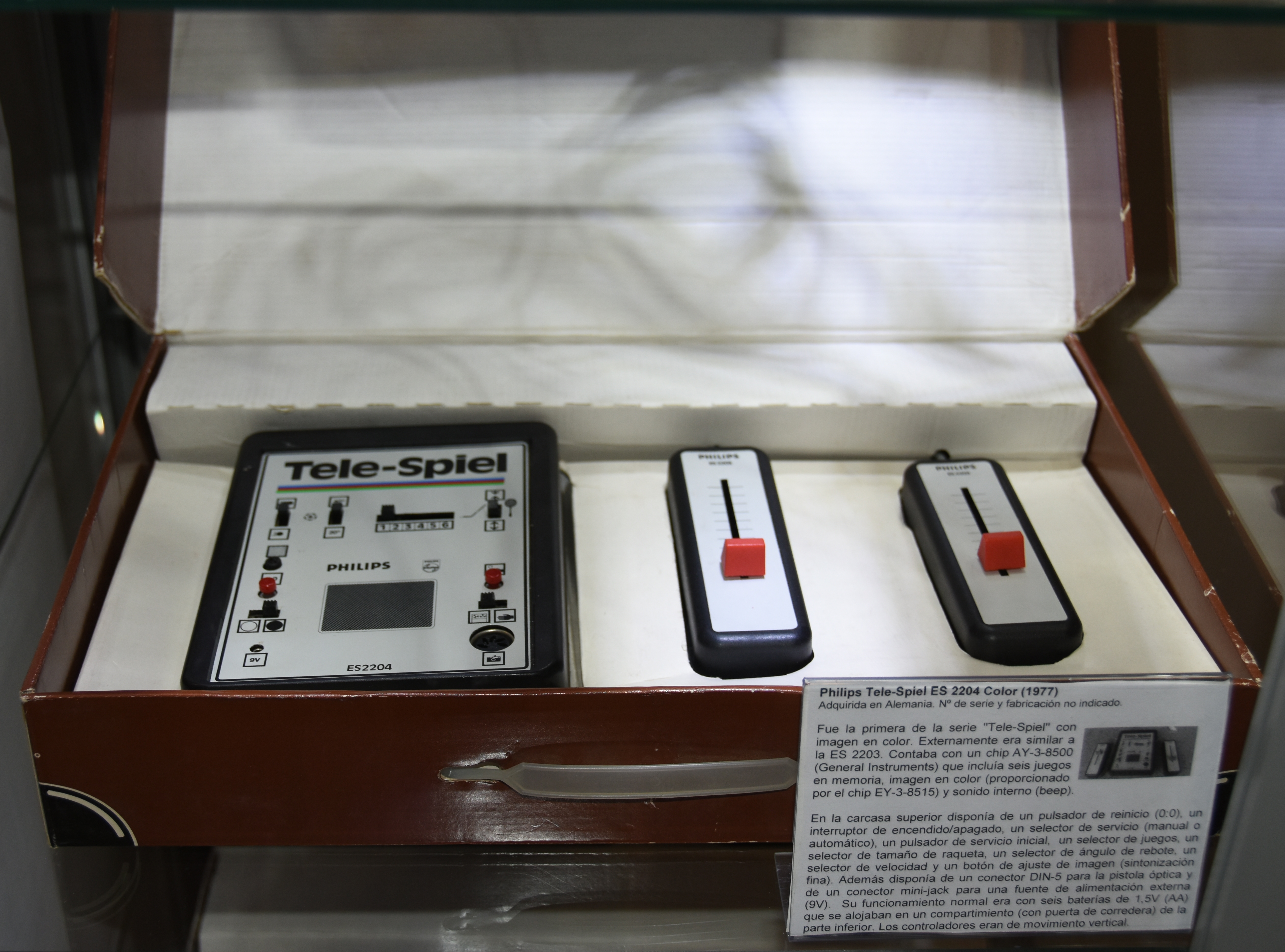 Philips Tele-Spiel ES 2204 Color. Pong console, 1977 [Fotos por cortesía de Fernando Sáenz]